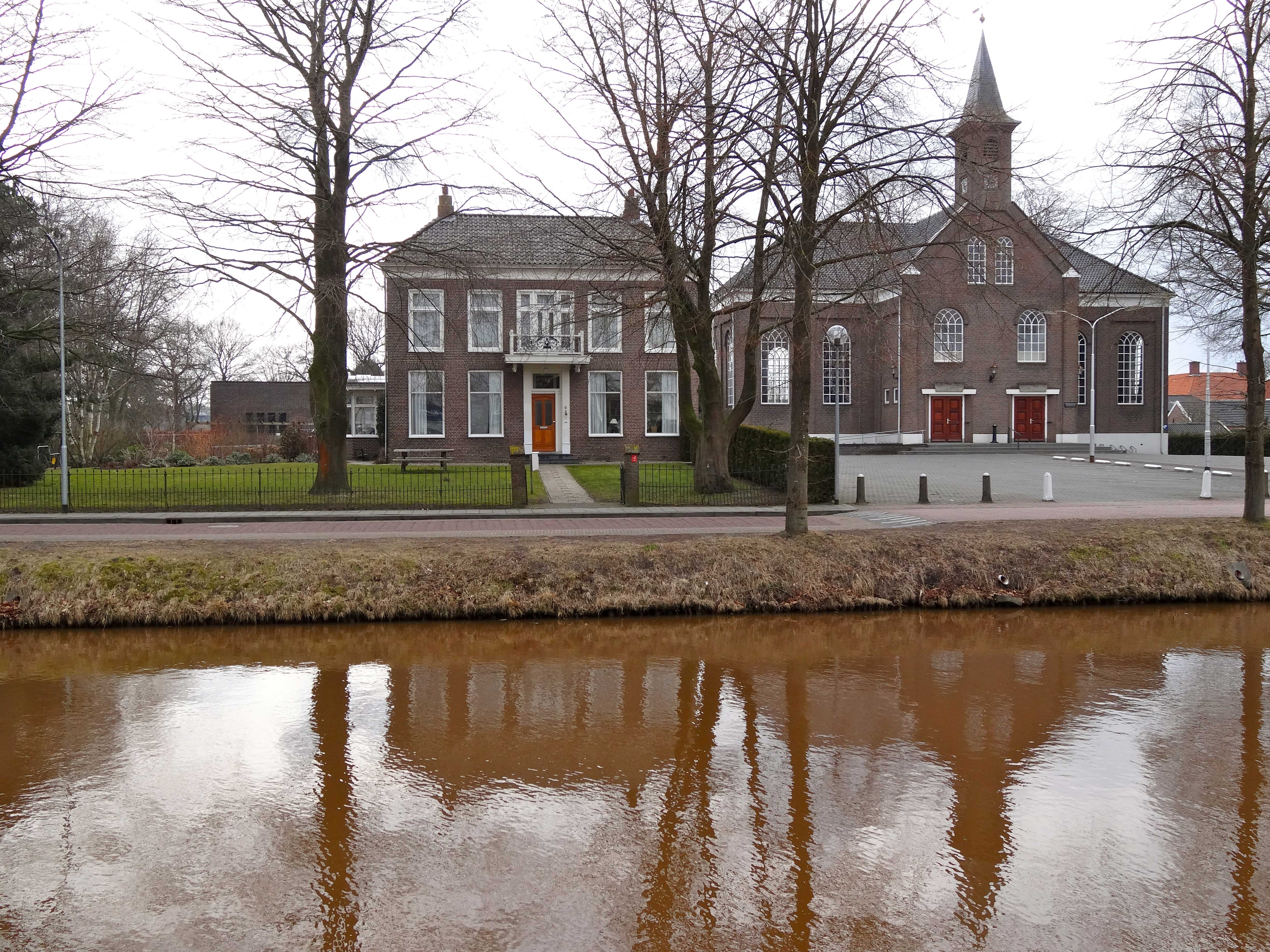 Oosterkadekerk en pastorie in Stadskanaal, gemeentelijk monument